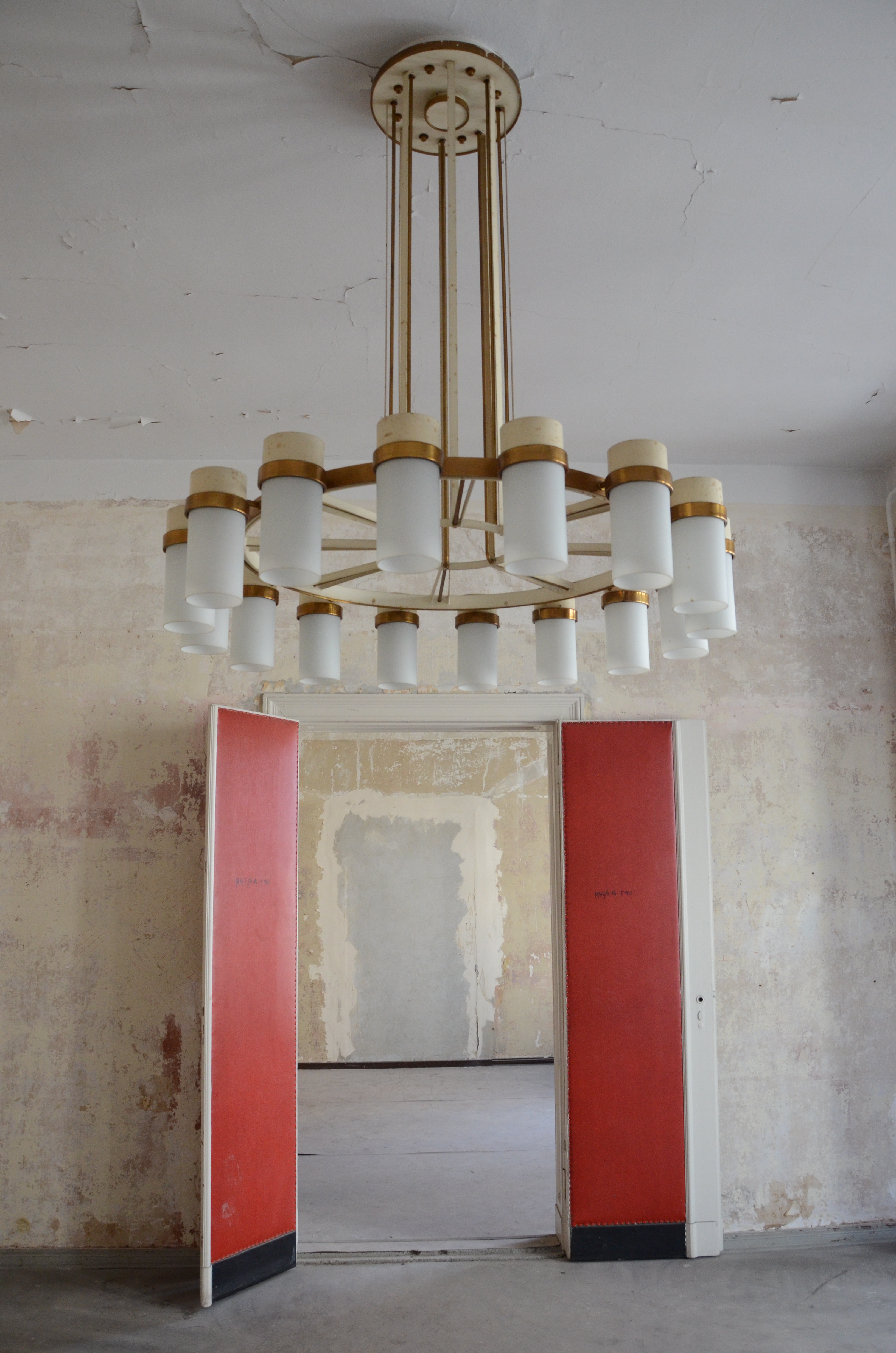 Kronleuchter im 1. Obergeschoss